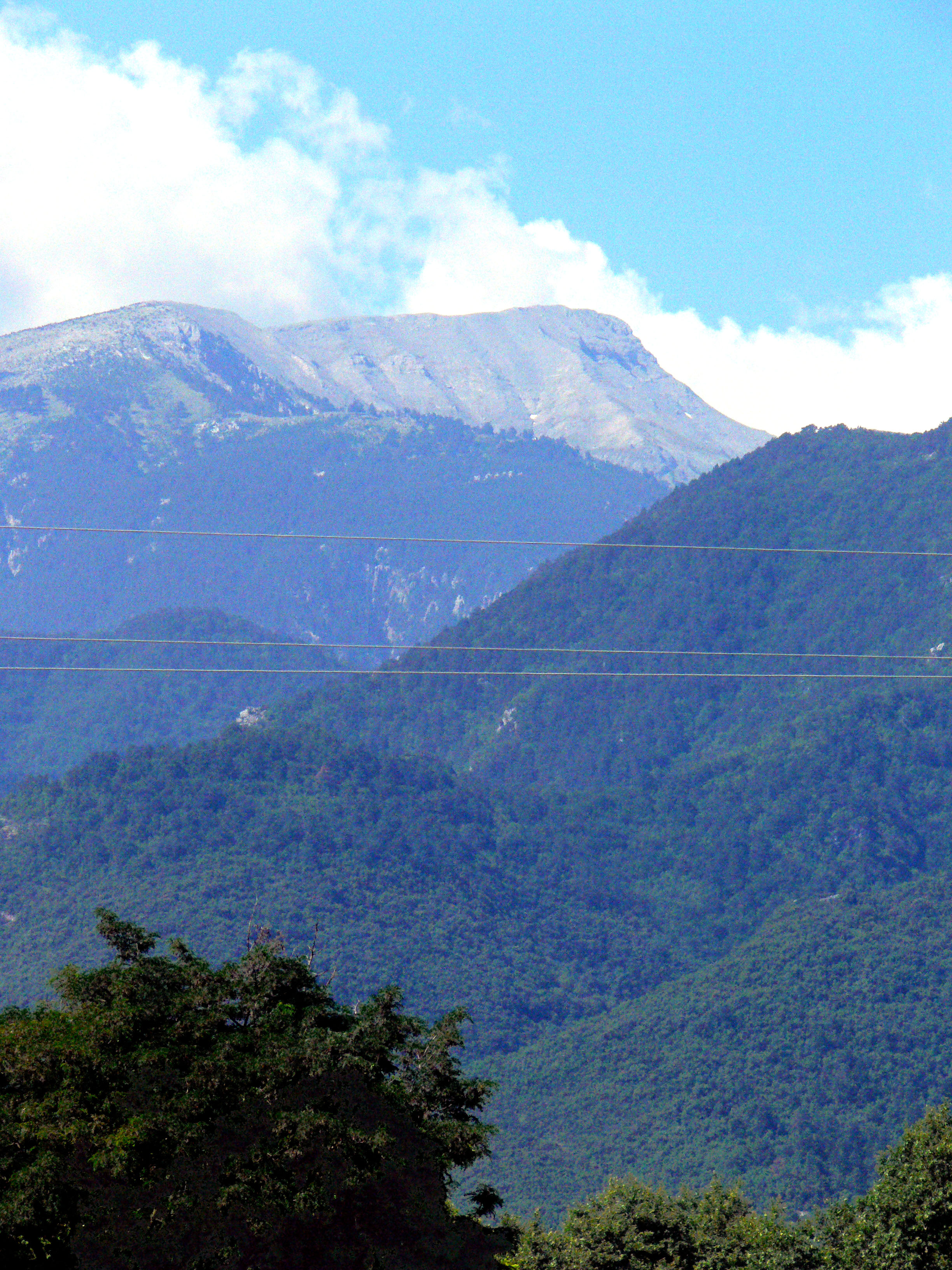 Olymp von Dio aus.